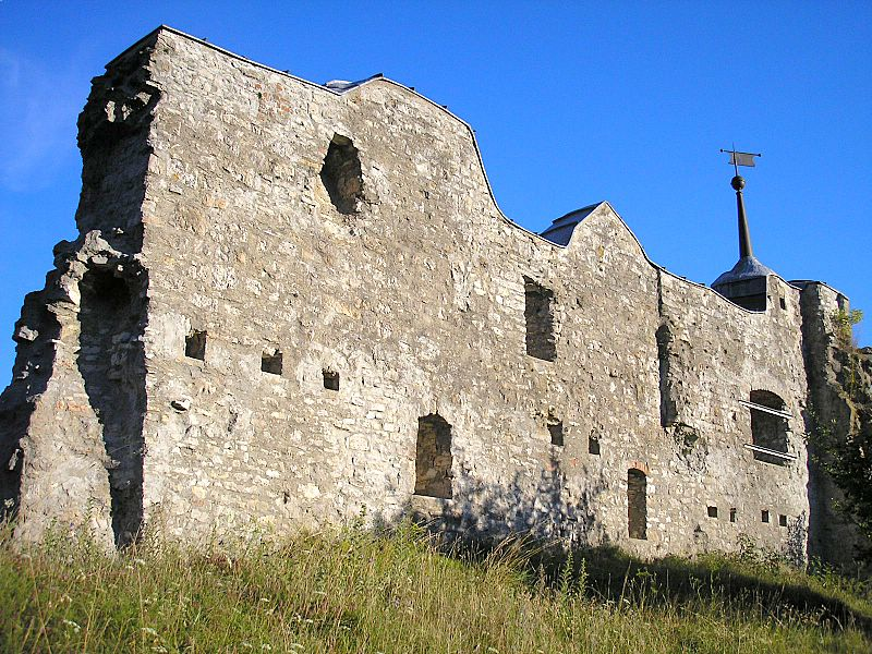 Burg Hütting (Markt Rennertshofen, Landkreis Neuburg-Schrobenhausen, Oberbayern). Letzte Mauerreste der Hauptburg auf dem Burgfelsen. Eigene Aufnahme, Aug. 2007 / Huetting castle near Rennertshofen (Upper Bavaria, Germany). The ruin on the hilltop. Own photo, Aug. 2007